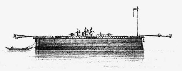 Беляна